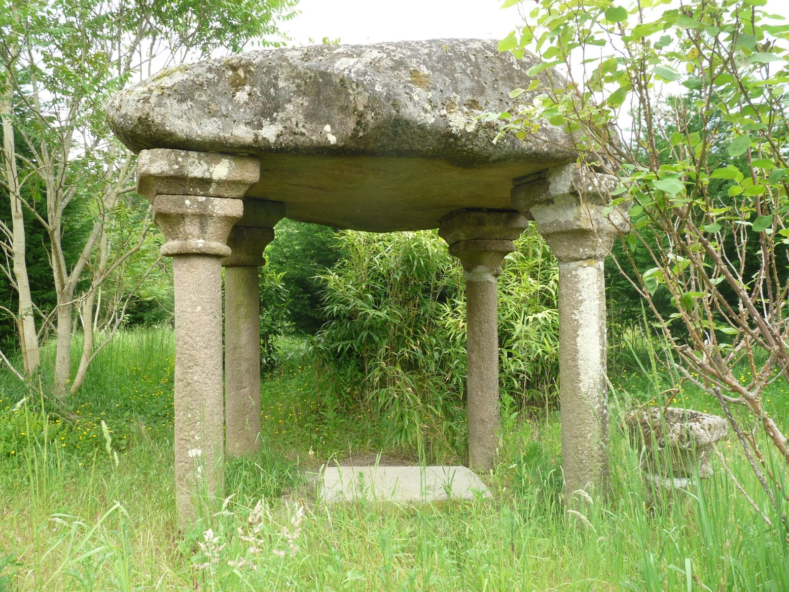 dolmen de Sainte-Madeleine, Lessac, Charente, France; matériau: granit